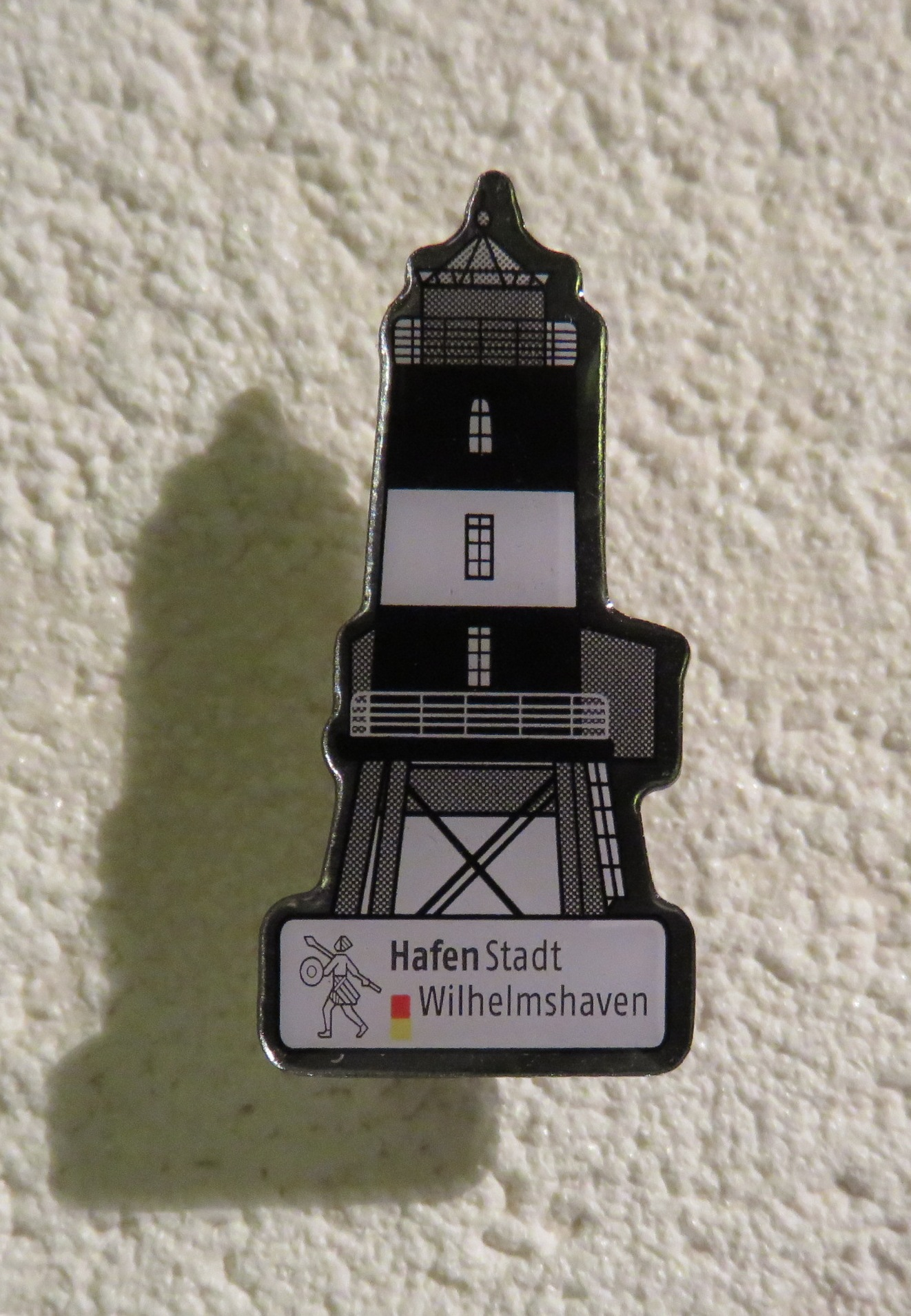 Der Jade-Pin 2012 zeigt den alten Voslapper Leuchtturm